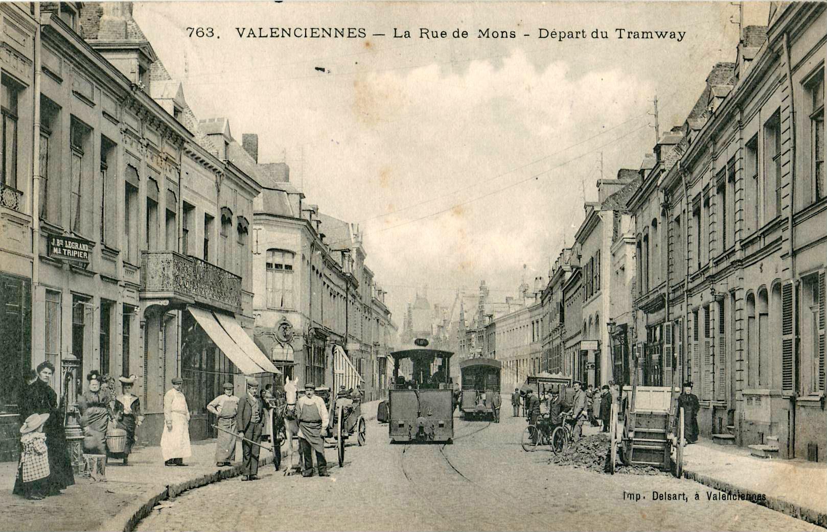 Carte postale ancienne éditée par Delsart à Valenciennes, n°763 :VALENCIENNES : La Rue de Mons - Départ du Tramway